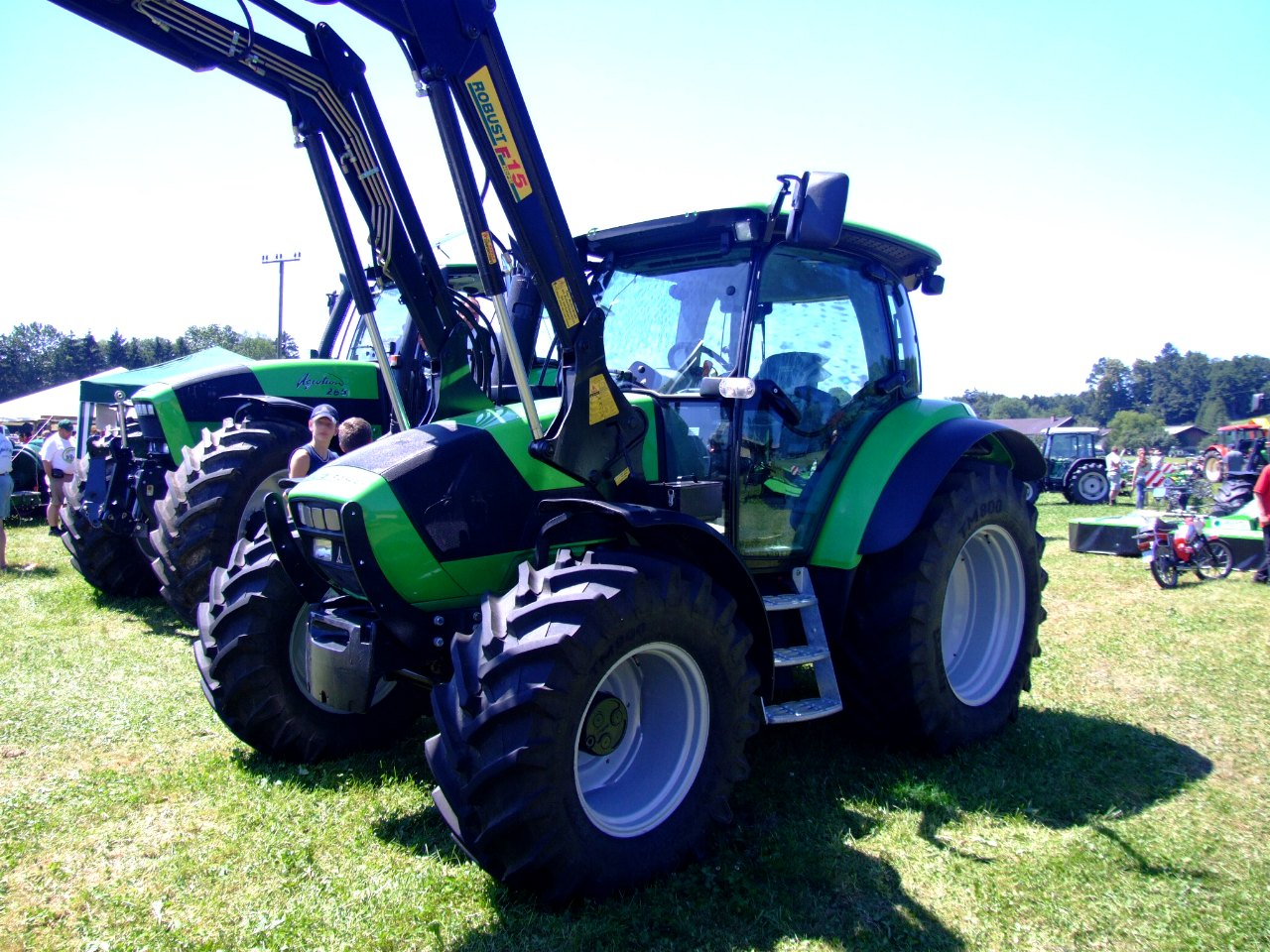 Deutz-Fahr Agrotron K90 mit Stoll-Frontlader, dahinter ein Deutz-Fahr Agrotron 265